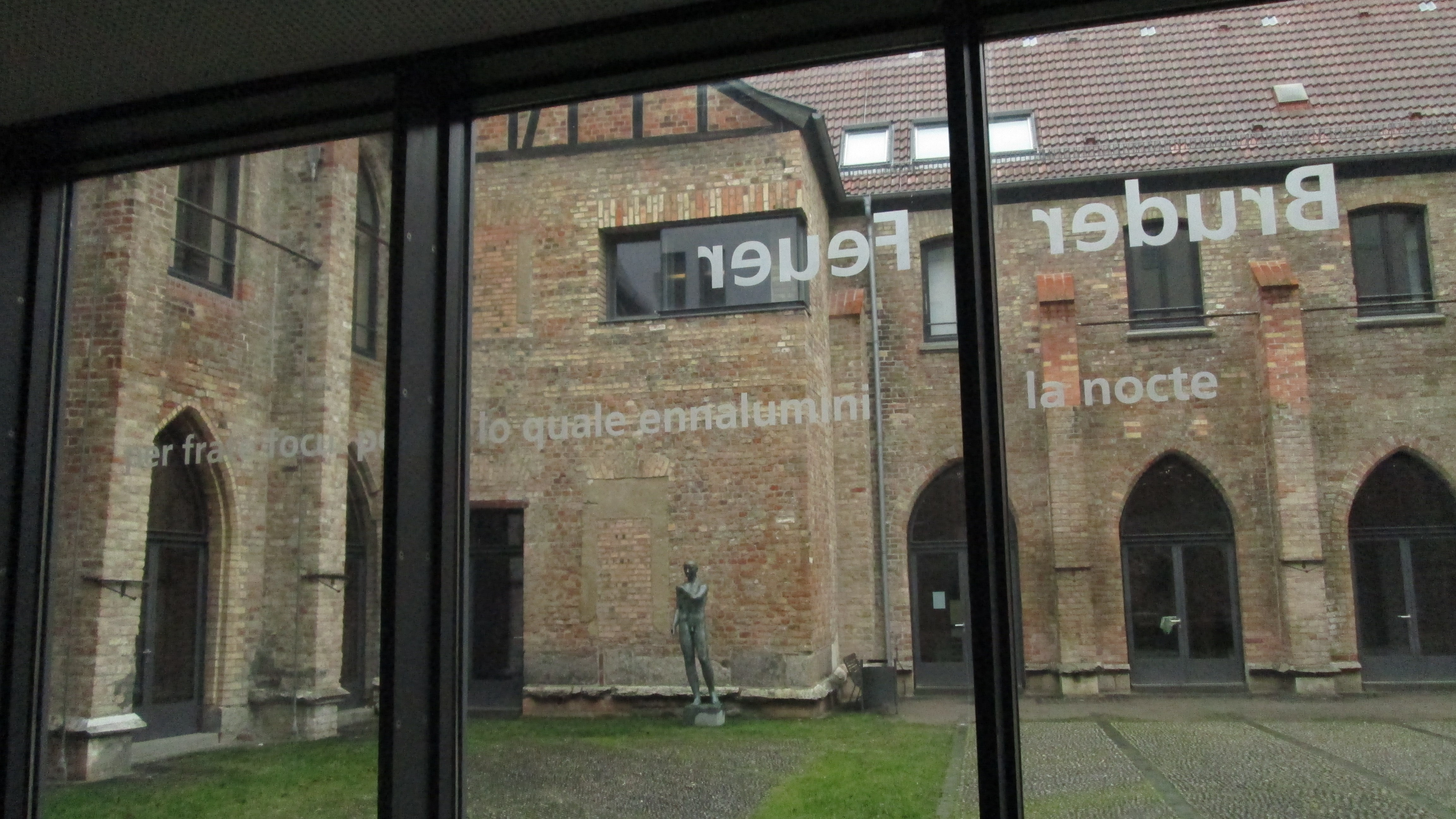 Hochschule für Musik und Theater Rostock - Innenhof, auf dem Fenster ein Zitat aus dem Sonnengesang des heiligen Franziskus ("Gelobt seist du, Bruder Feuer"), in Anklang an das mittelalterliche Franziskanerkloster an dieser Stelle